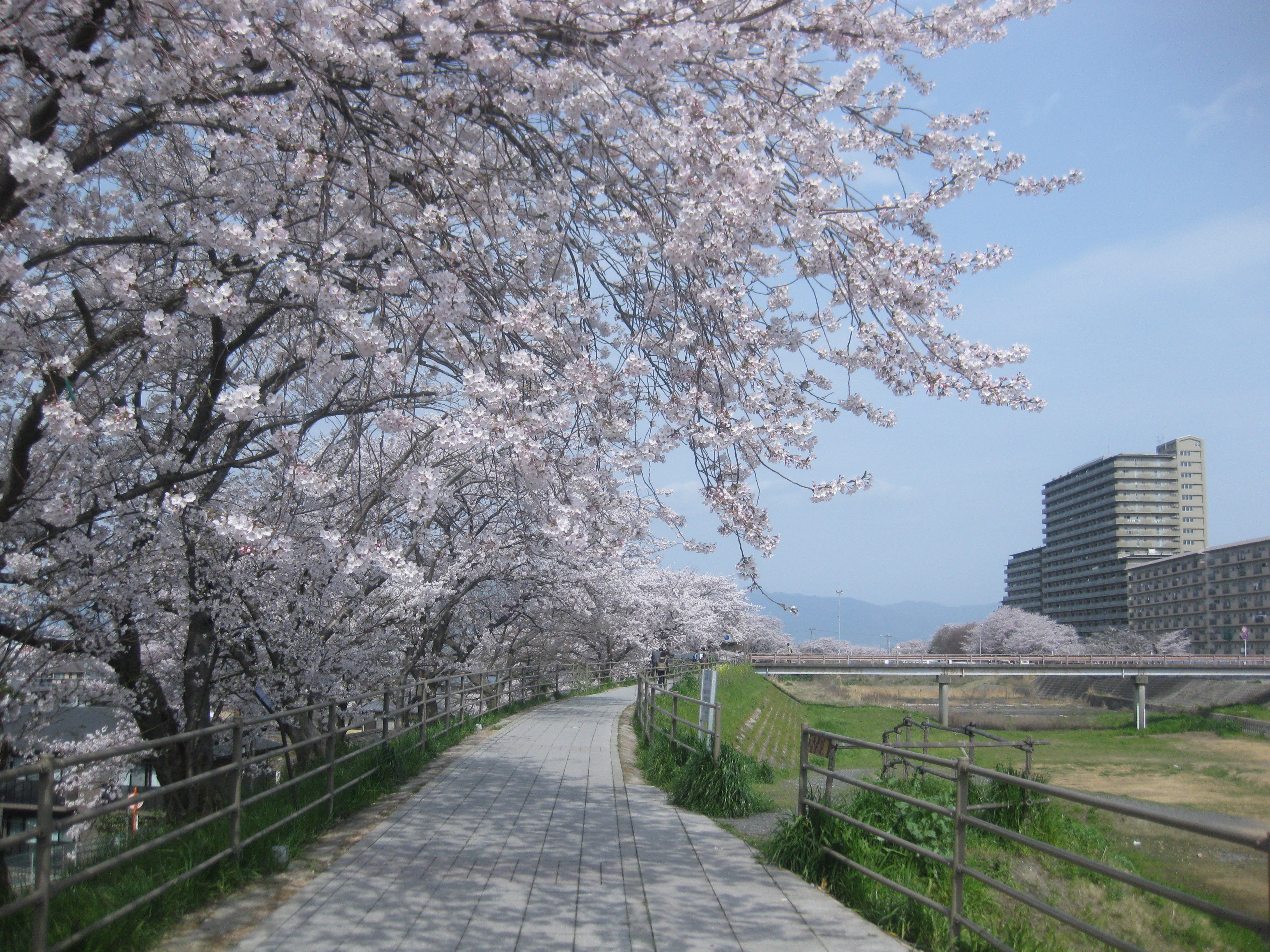 春の旧草津川。2012年撮影。